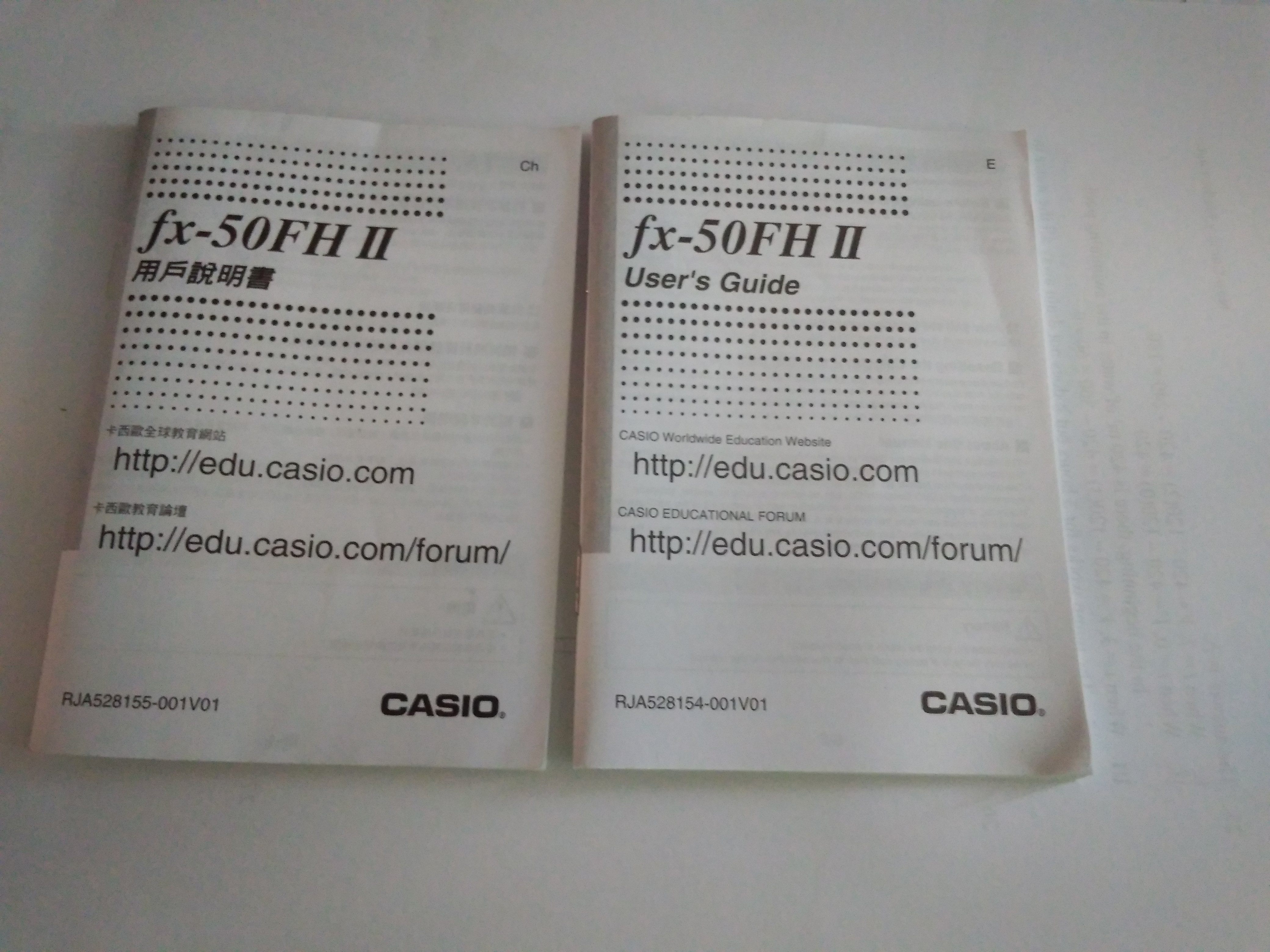 user guide